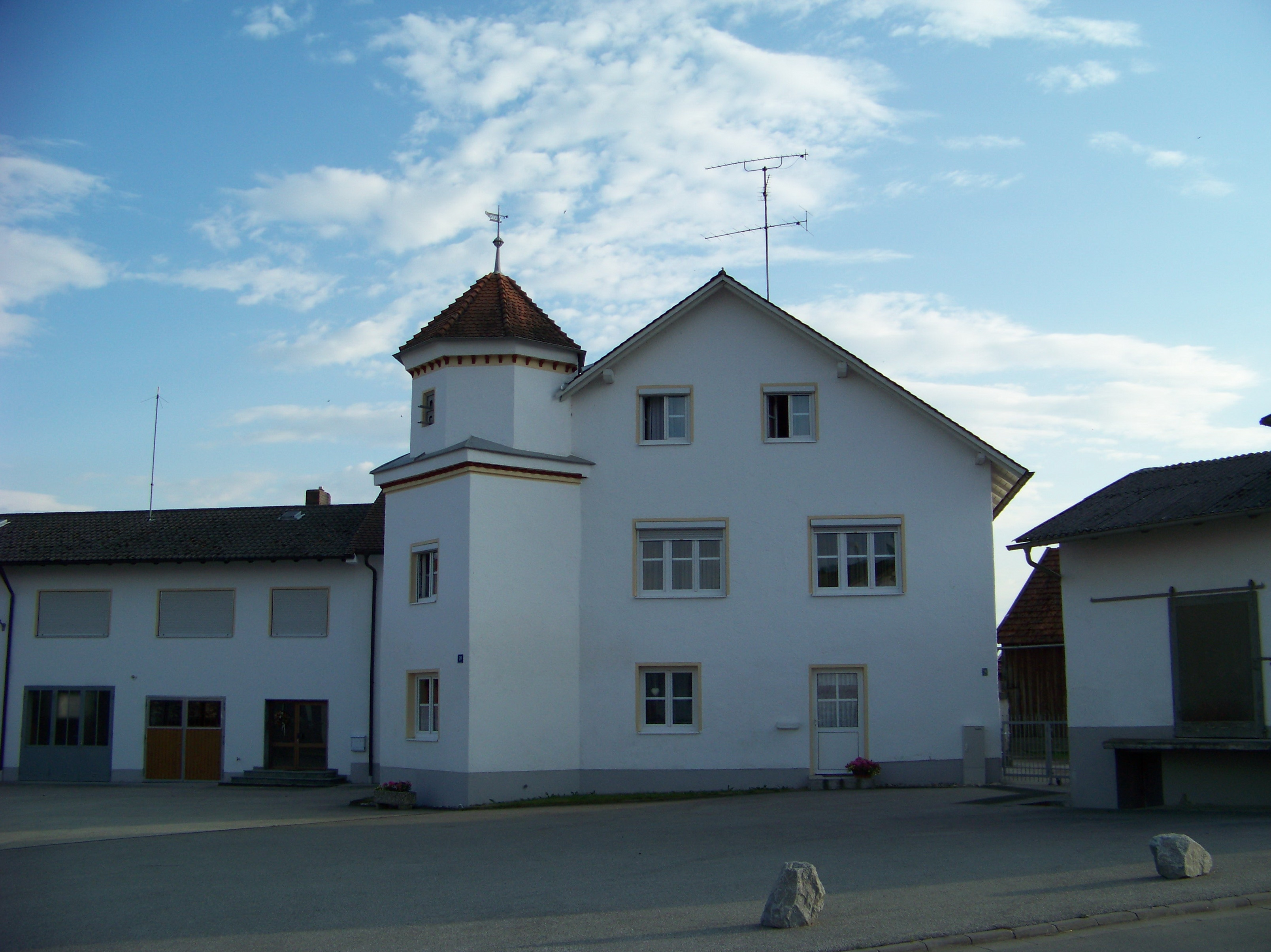 Habelsbach, ehem. Schloß, heute Wohnhaus